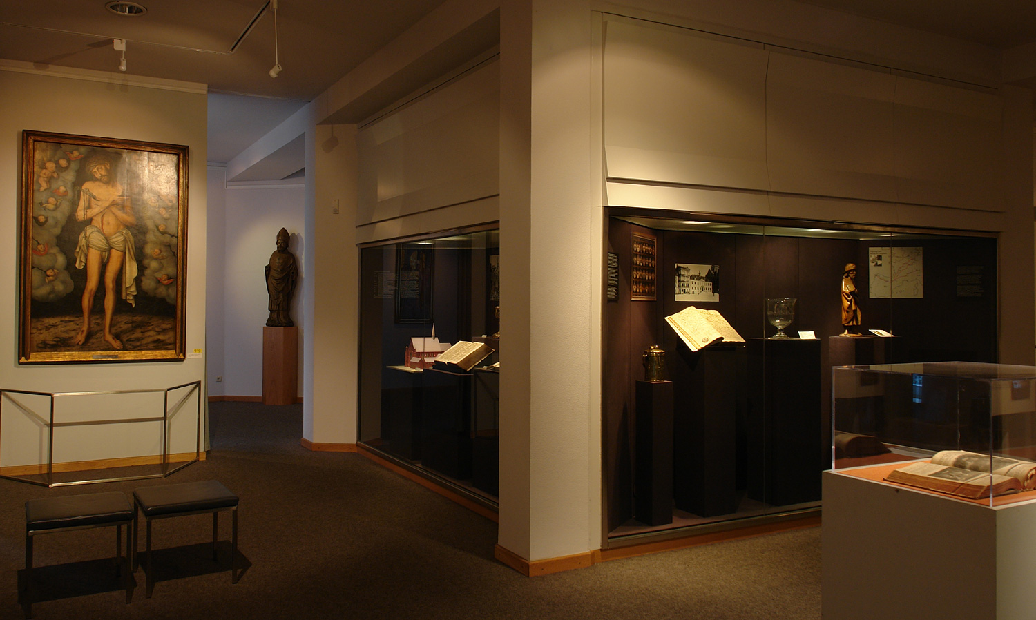 Bremer Dom-Museum: Ausstellungsraum im Neubau mit Christusgemälde der „Schmerzensmann“ von Lucas Cranach d.Ä.